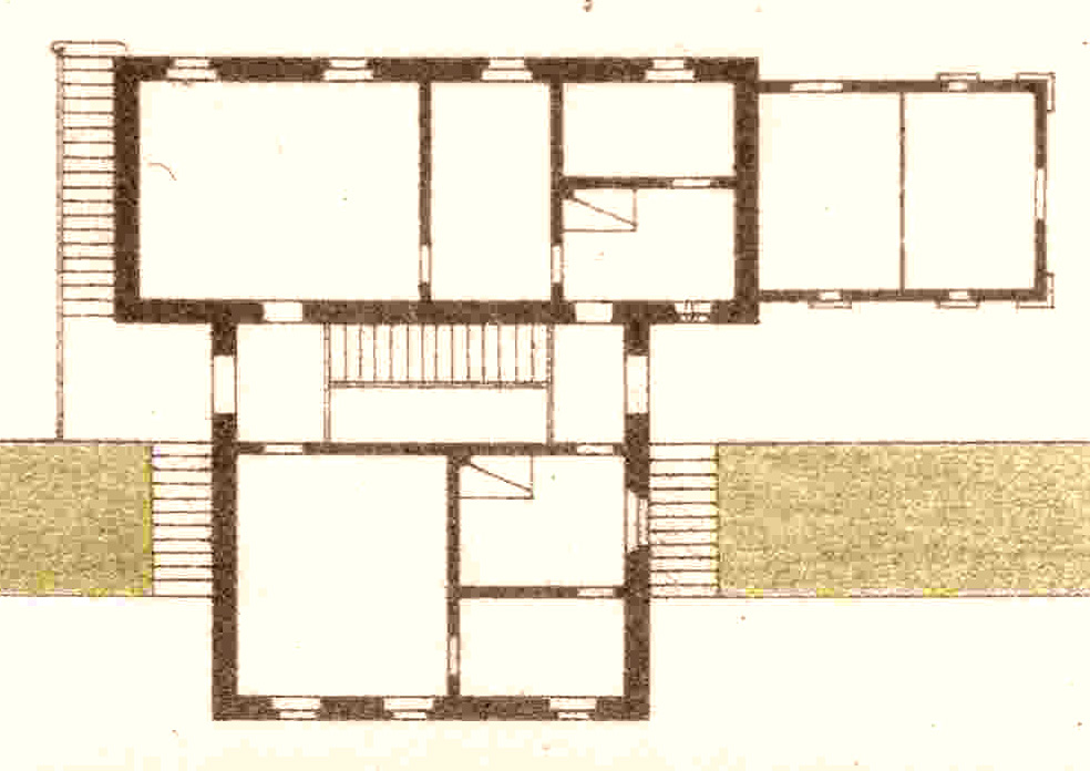 Grundriss des Schweizerhaus 2